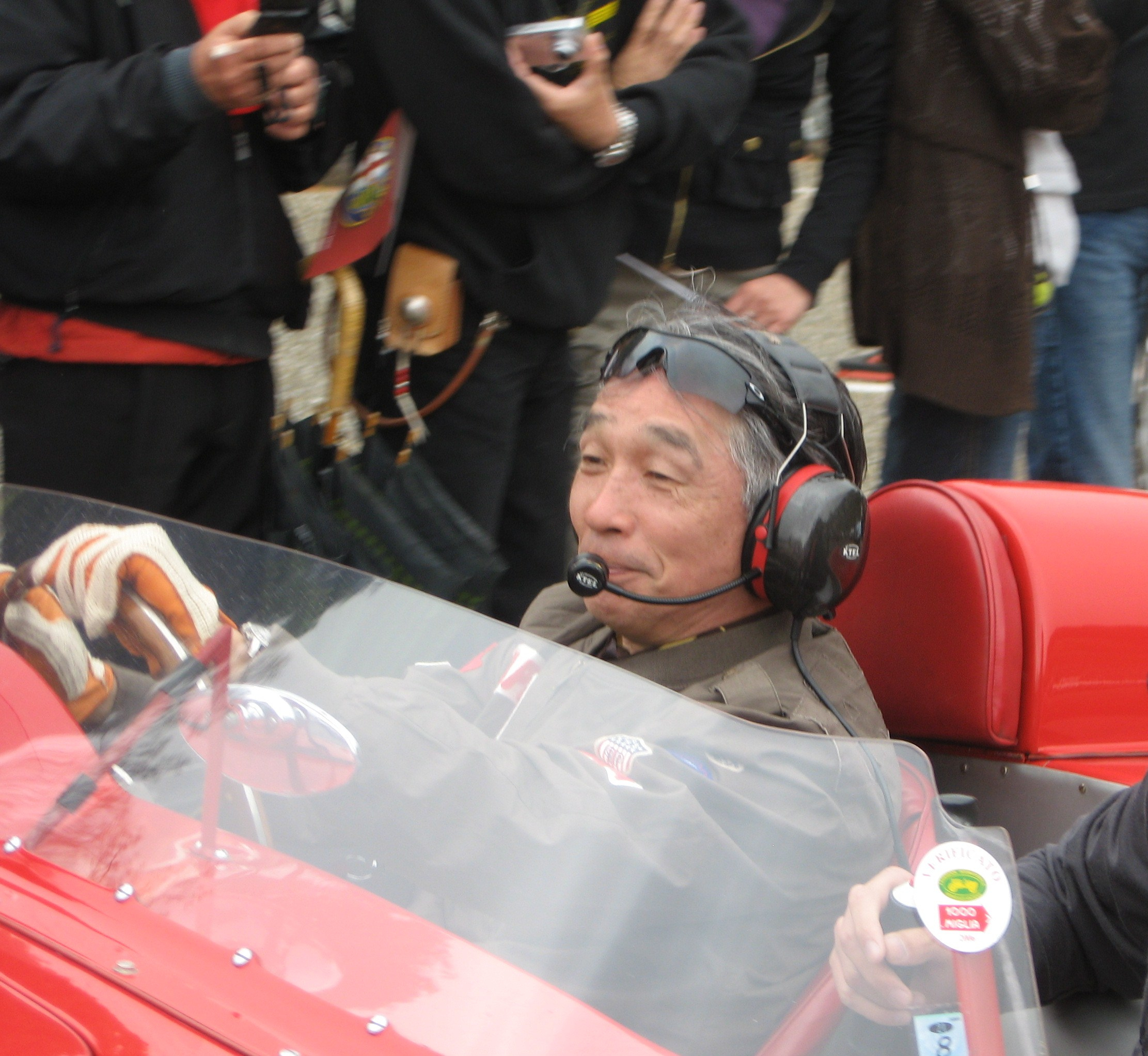 ラ・フェスタ プリマヴェラ2009に参加中の堺正章。伊賀の国 大山田温泉さるびの 第1駐車場にて。1957年式のマセラティ200SIに乗車。